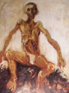 Schilderwerk Raoul Van den Heede